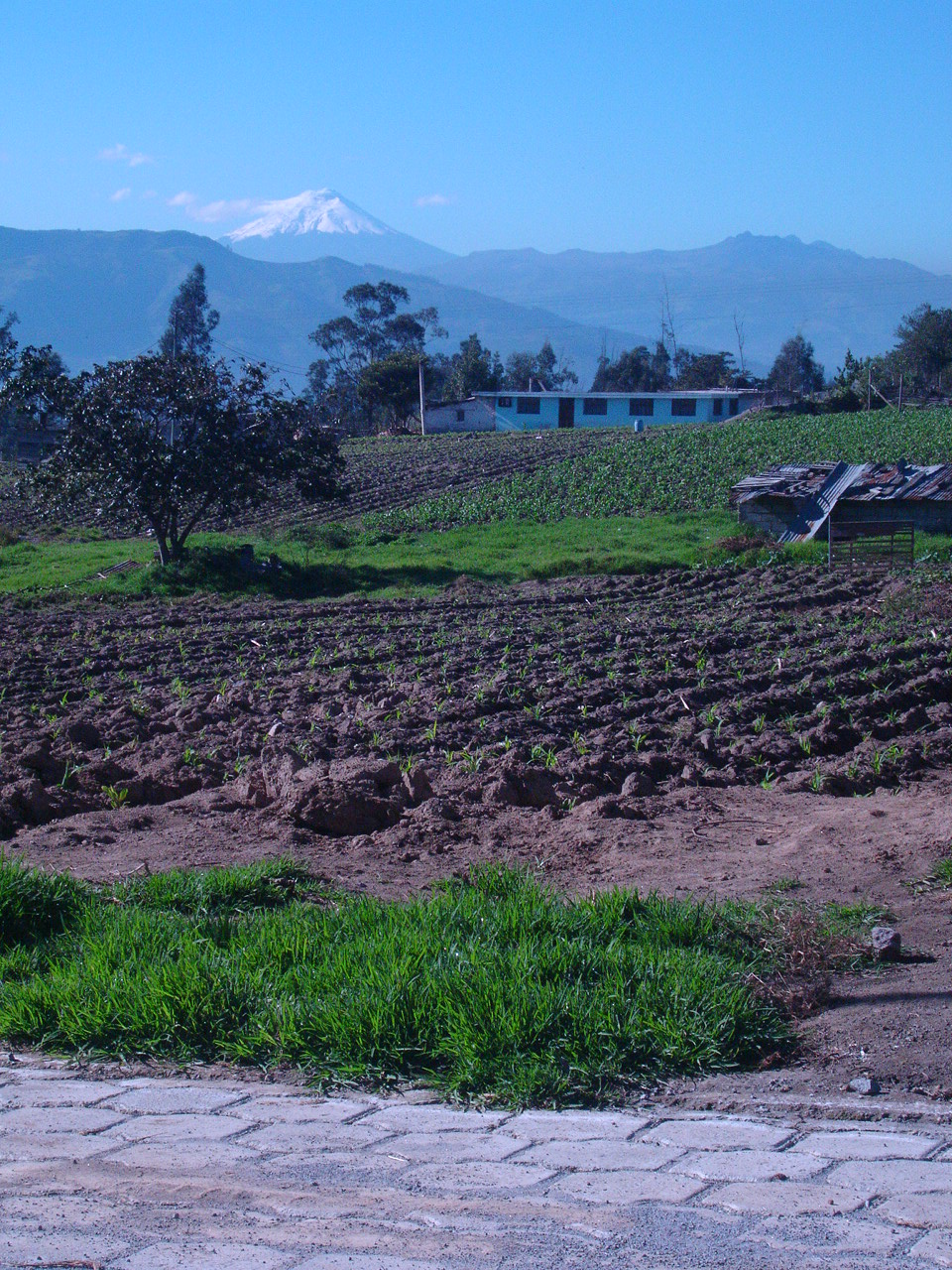 Esta foto es una parroquia suburbana de Quito Ecuador que esta creciendo muy rápido y pronto pertenecerá al tejido urbano al fondo se encuentra el volcán Cotopaxi